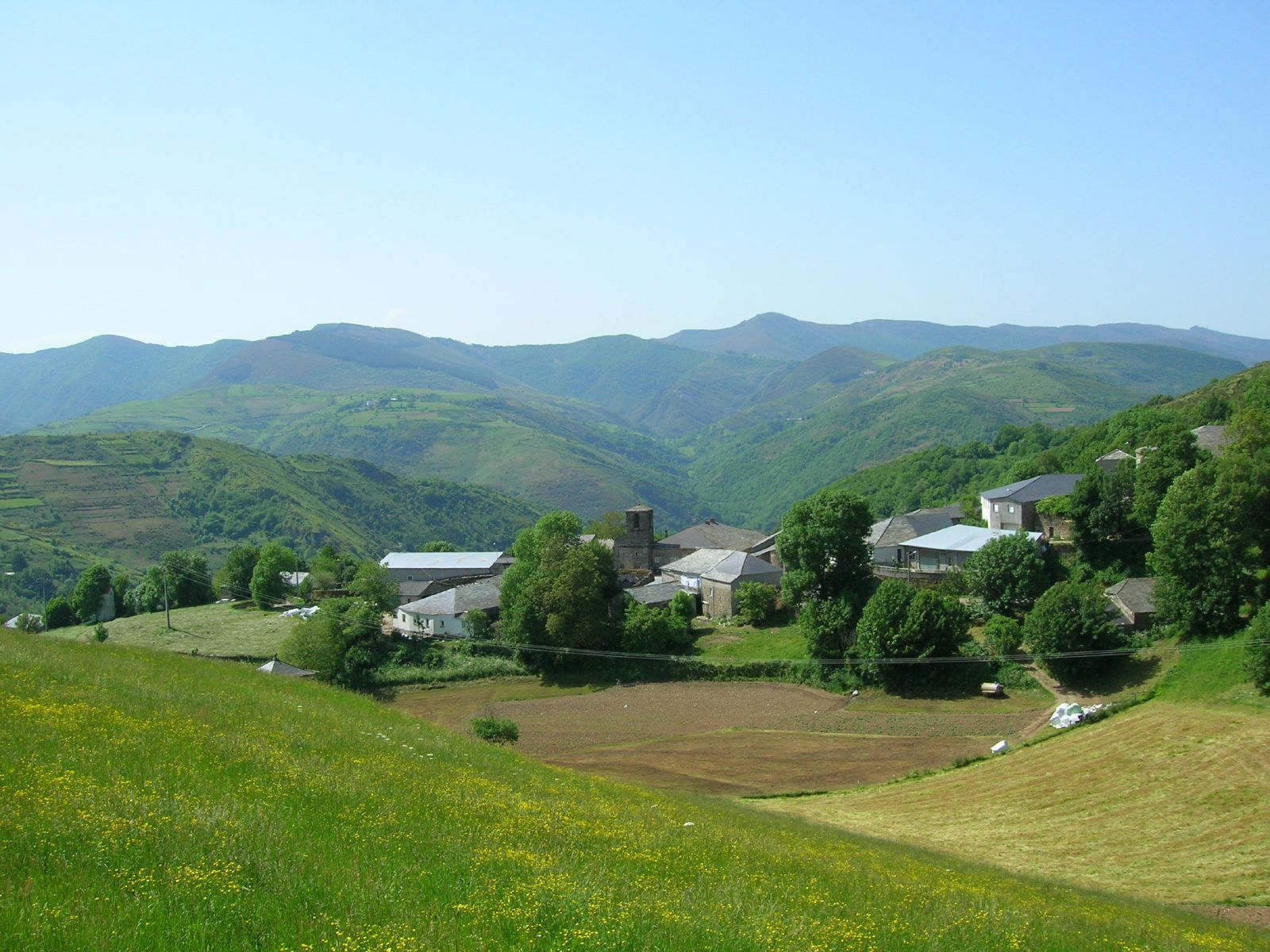 O lugar de Pacios encóntrase no extremo máis ó norte do Courel, Galiza